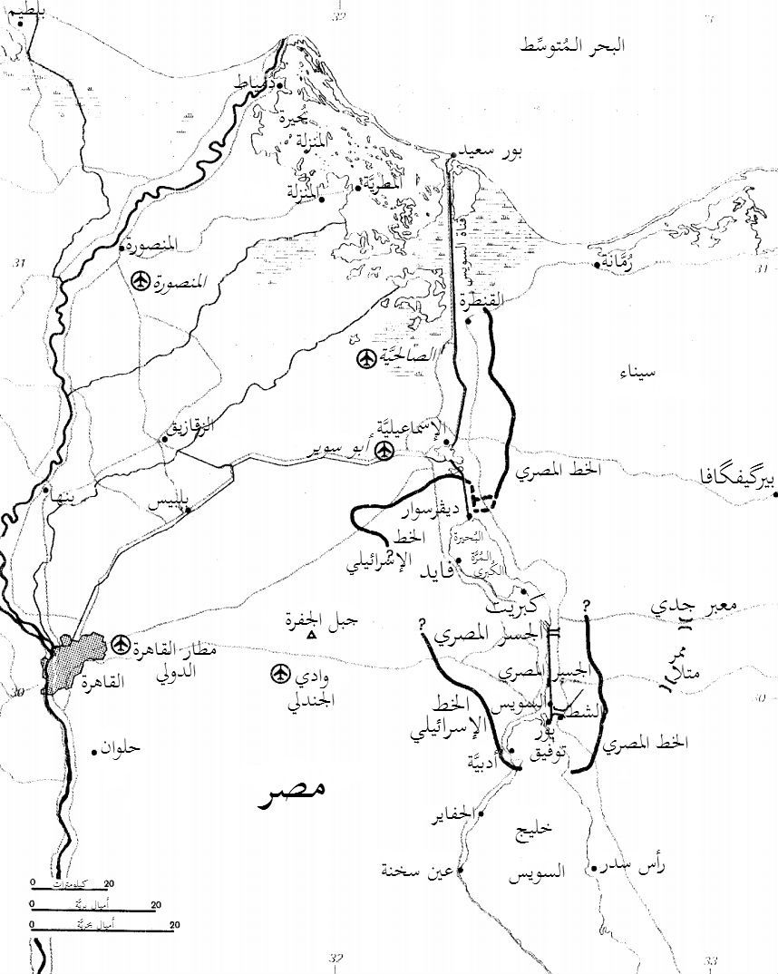 خارطة تُظهر مواقع مطارات القُوَّات الجويَّة المصريَّة على مقربة من قناة السُويس، بتاريخ 30 تشرين الأوَّل (أكتوبر) 1973م، بعد خمسة أيَّام على توقيع مُعاهدة وقف إطلاق النار بين العرب وإسرائيل.